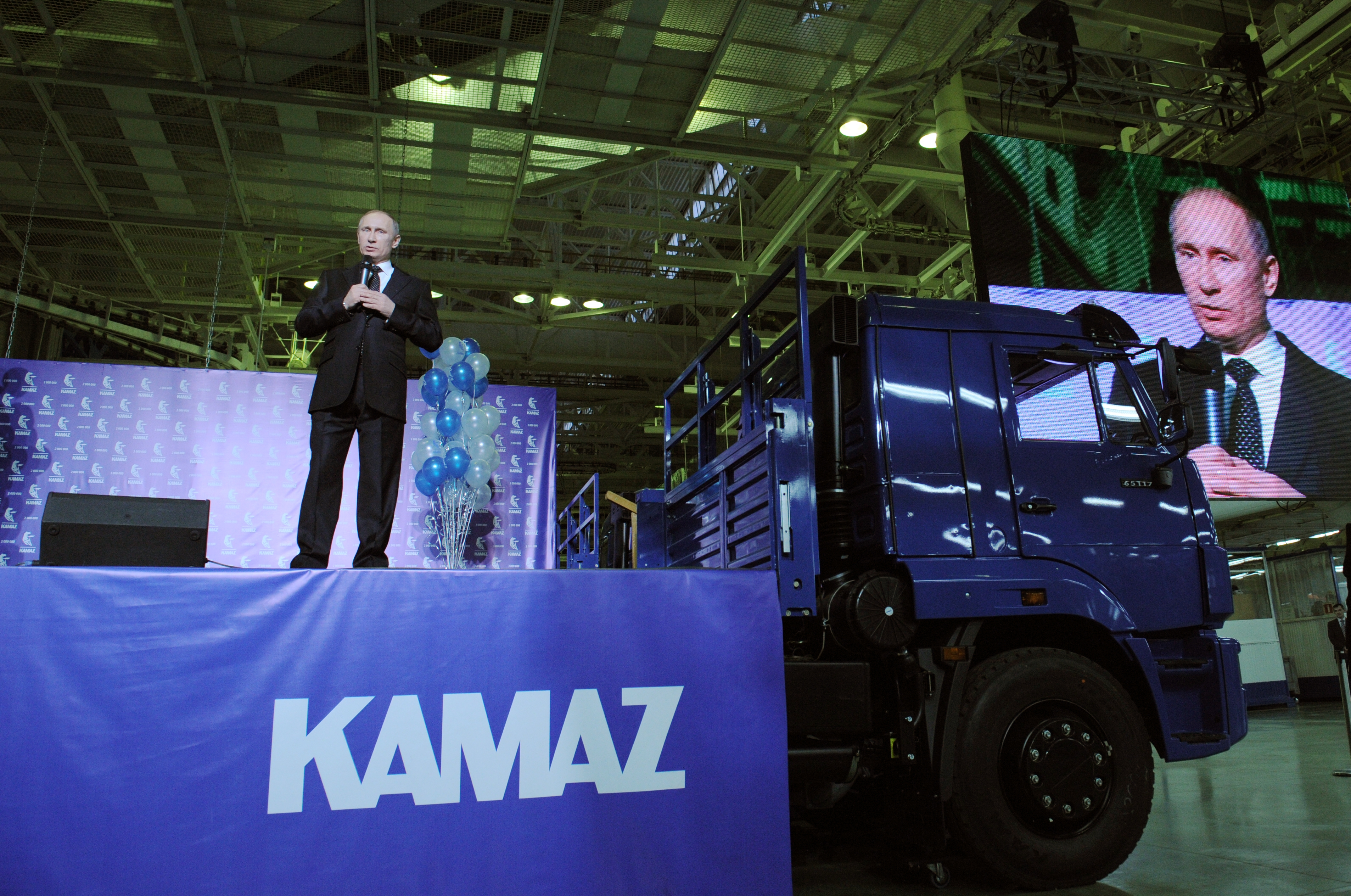 Председатель Правительства Российской Федерации В. В. Путин посетил автомобильный завод – ОАО «КАМАЗ», где принял участие в церемонии схода с конвейера 2-миллионного грузовика.